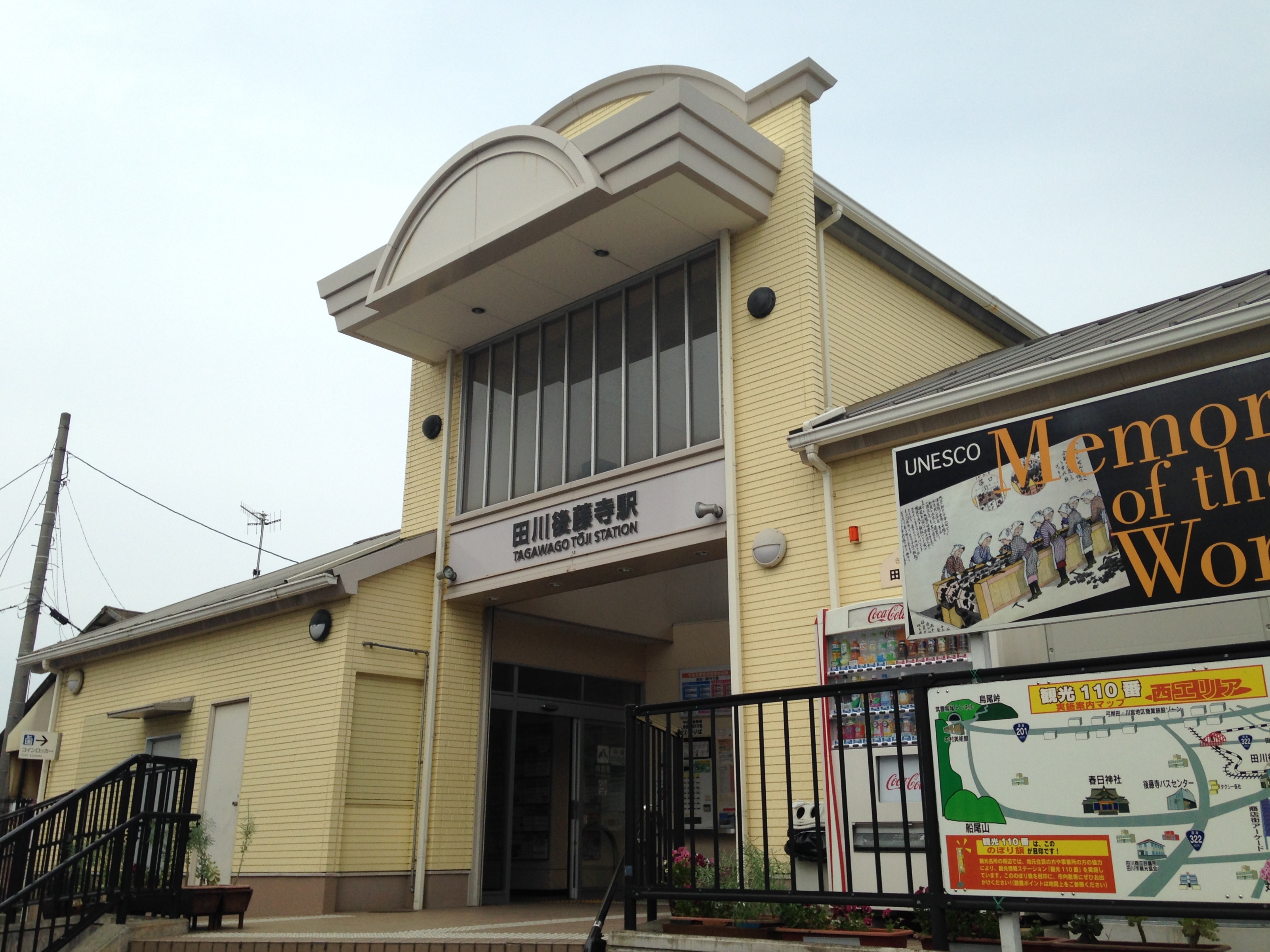 田川後藤寺駅駅舎